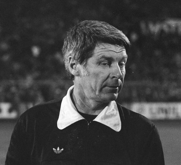 Europa Cup I wedstrijd Ajax tegen Nottingham Forest 0-1; Roemeense scheidsrechter Nicolae Rainea, kop